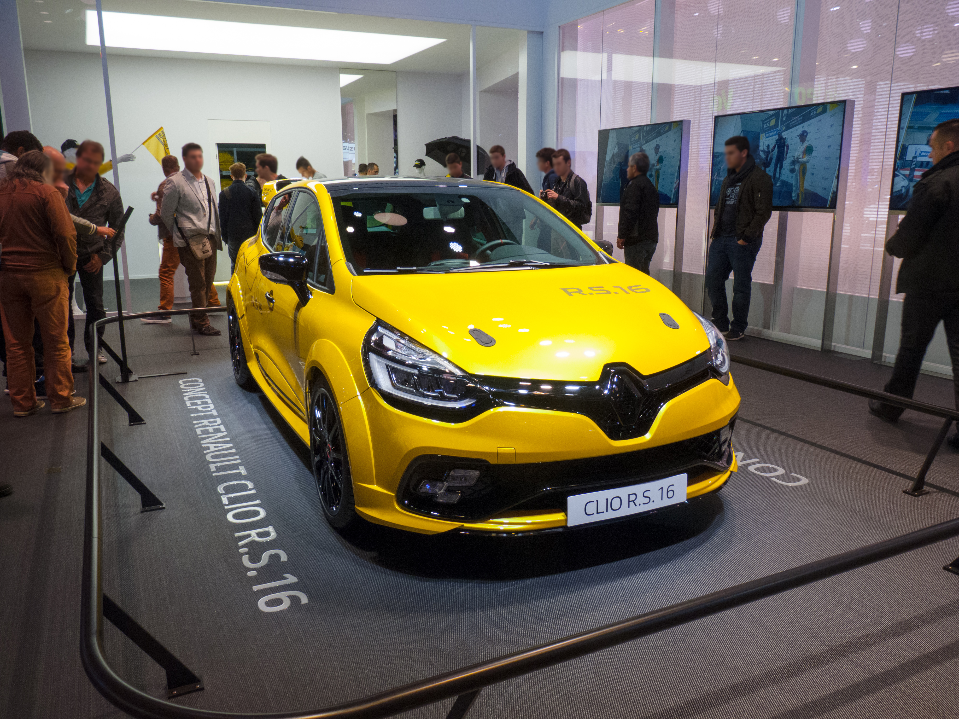 Renault Clio R.S. 16 au Mondial de l'automobile de Paris 2016